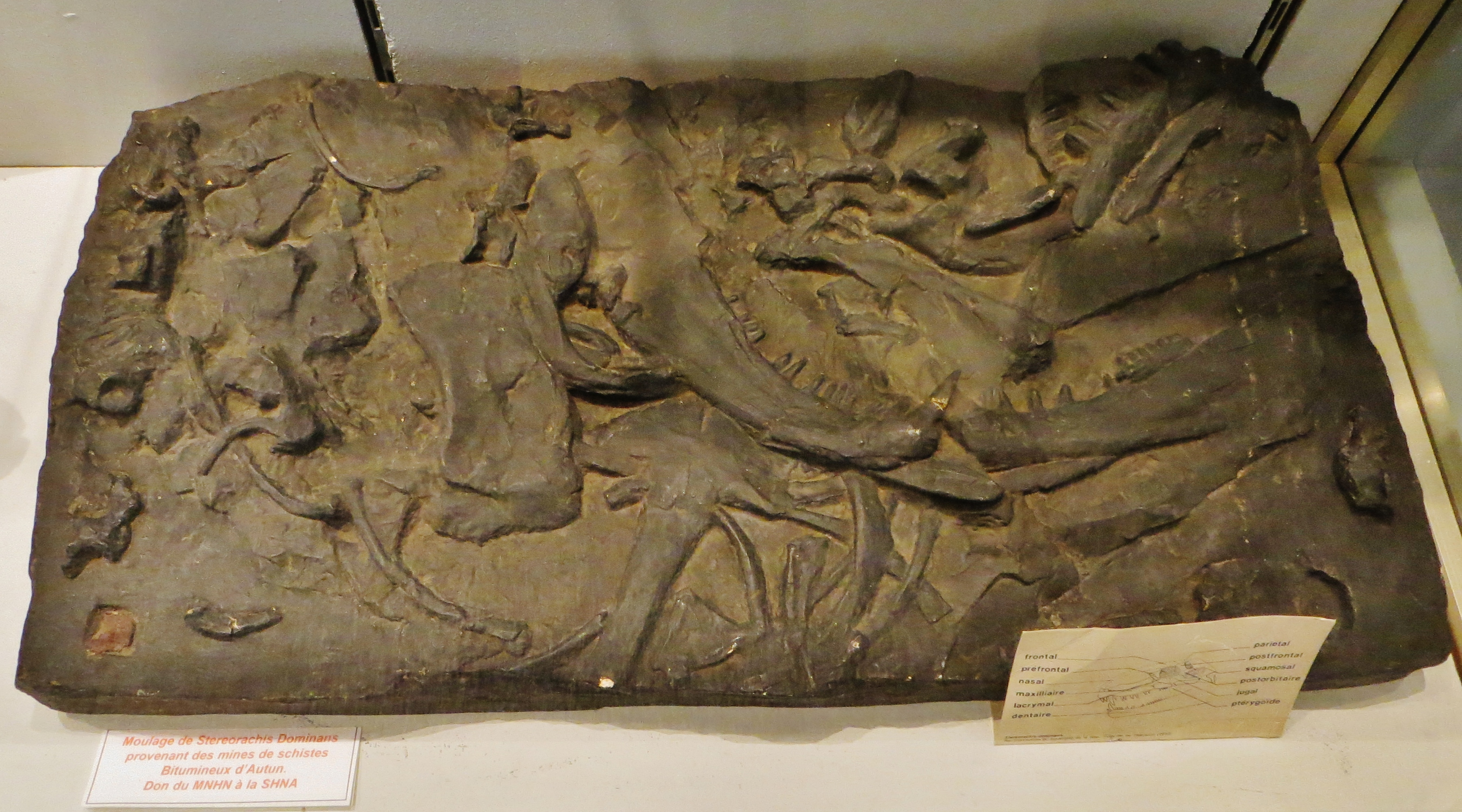 Fossil - Took the picture at Museum of Natural History, Autun